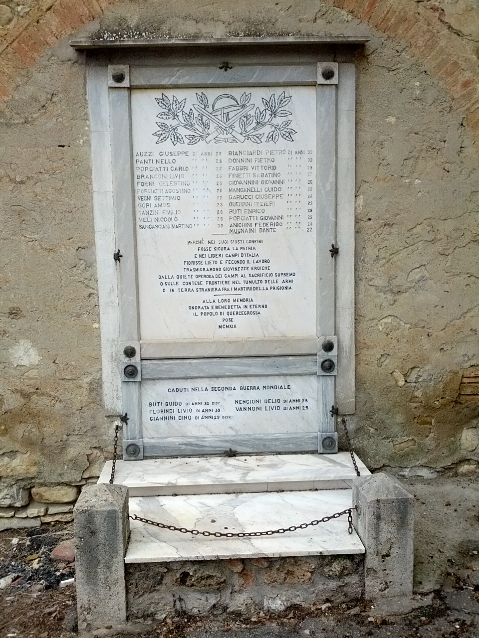 Lapide commerativa ai caduti della 1° e 2° guerra mondiale, Frazione Quercegrossa, Castelnuovo Berardenga/Monteriggioni